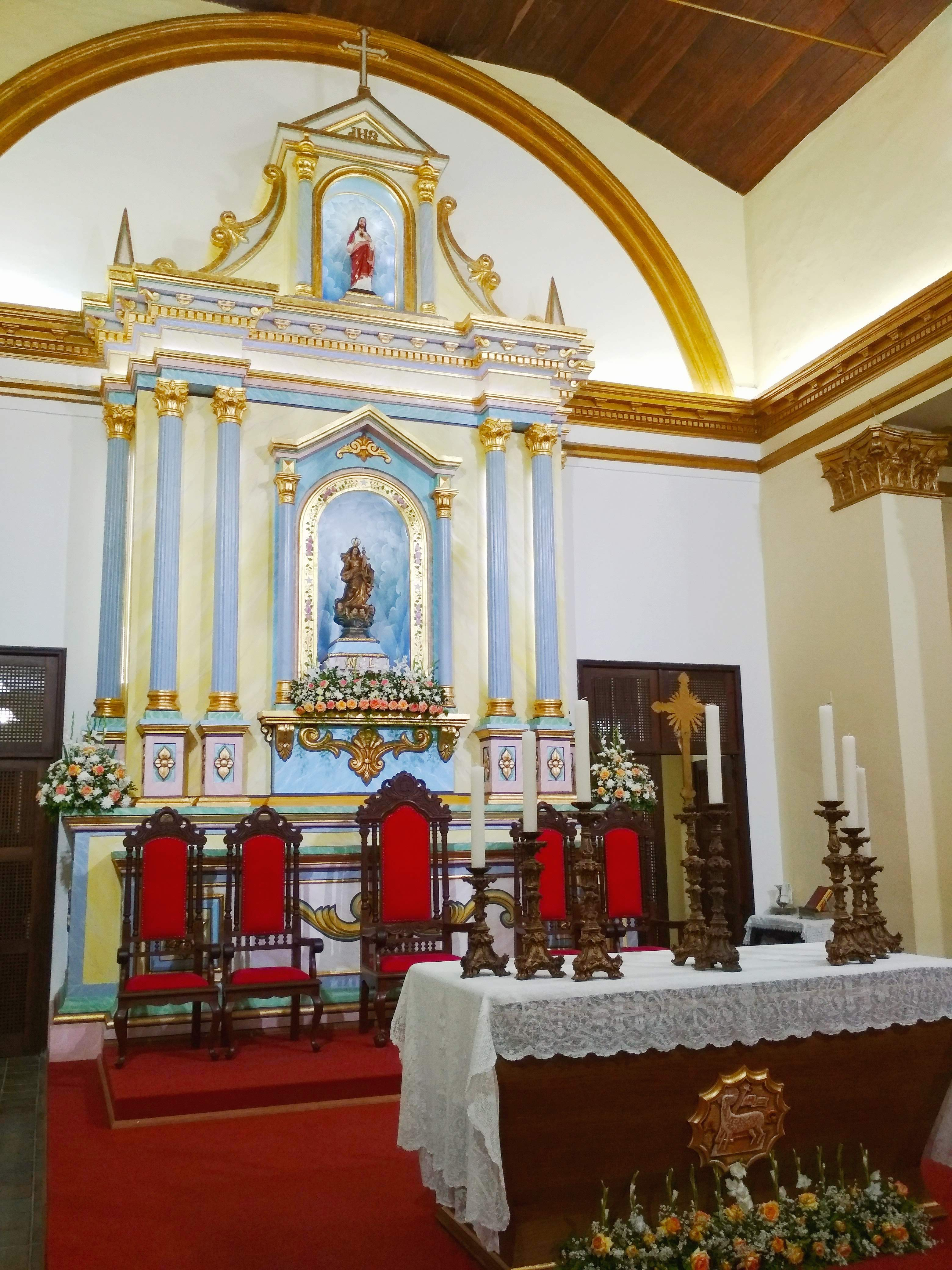 Padroeira da Diocese de Guarabira